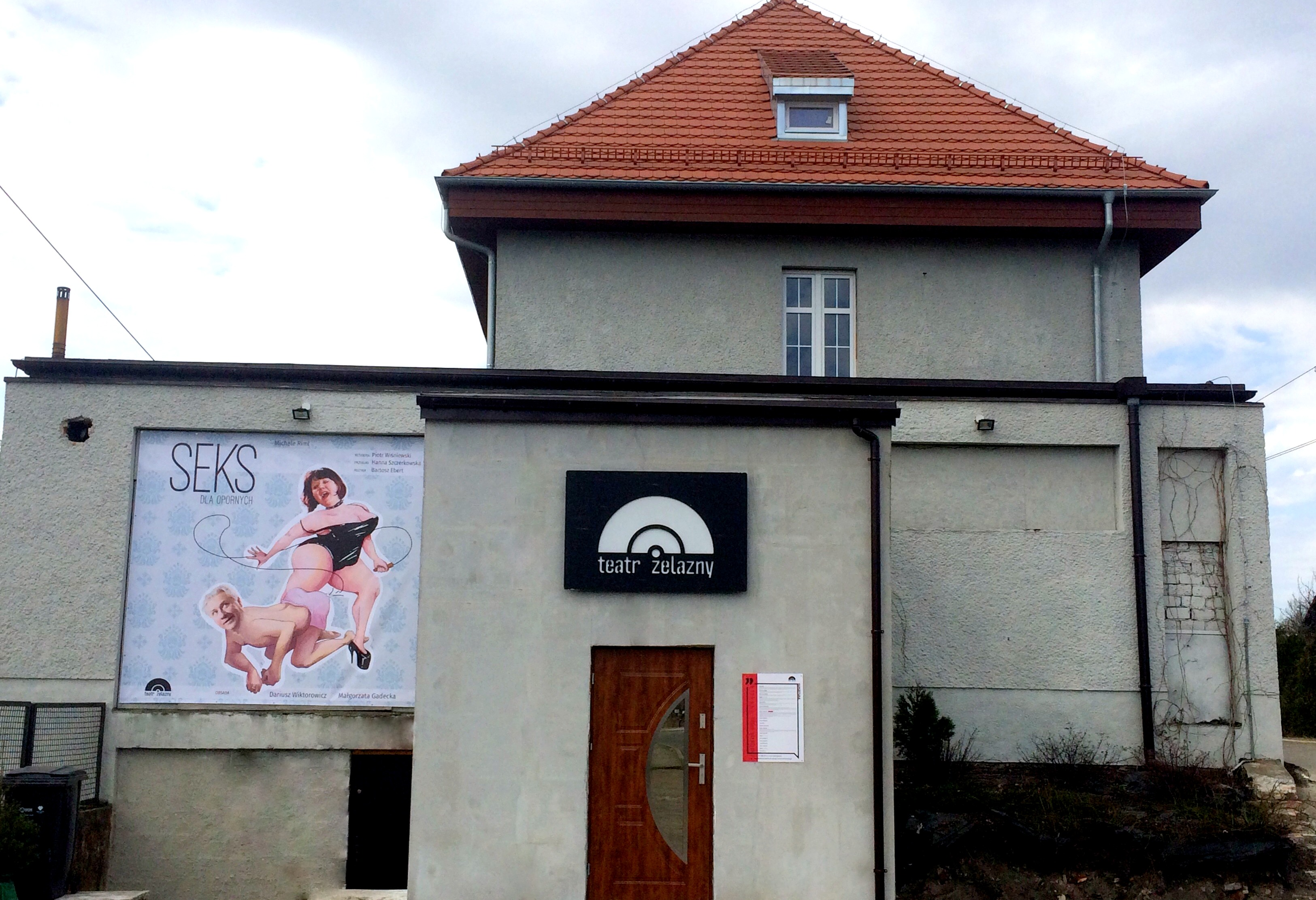 Teatr Żelazny